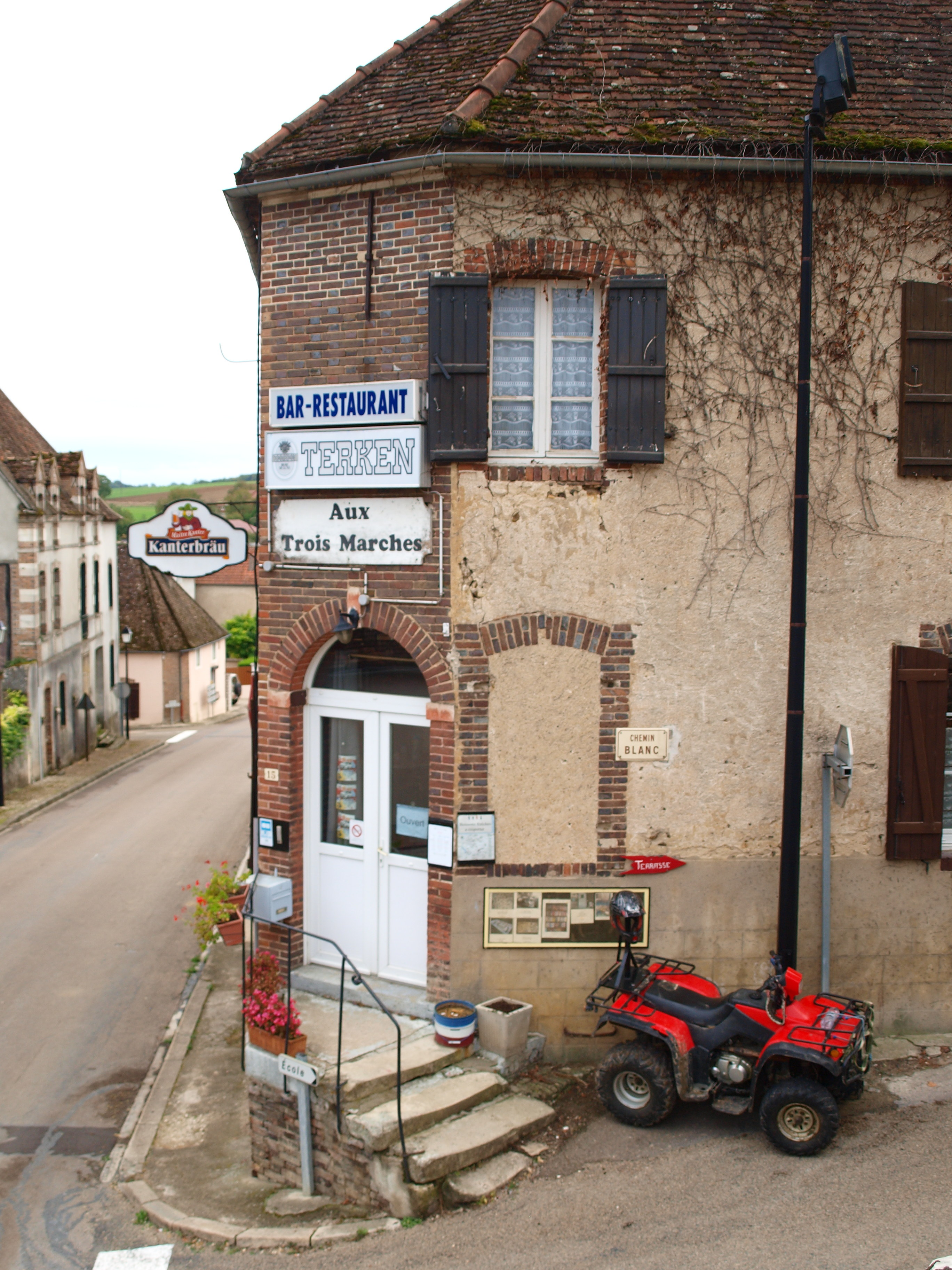 Précy-sur-Vrin (Yonne, France) ; troquet au coin de la Grande Rue (D3) et du Chemin Blanc. Vue vers l'ouest.